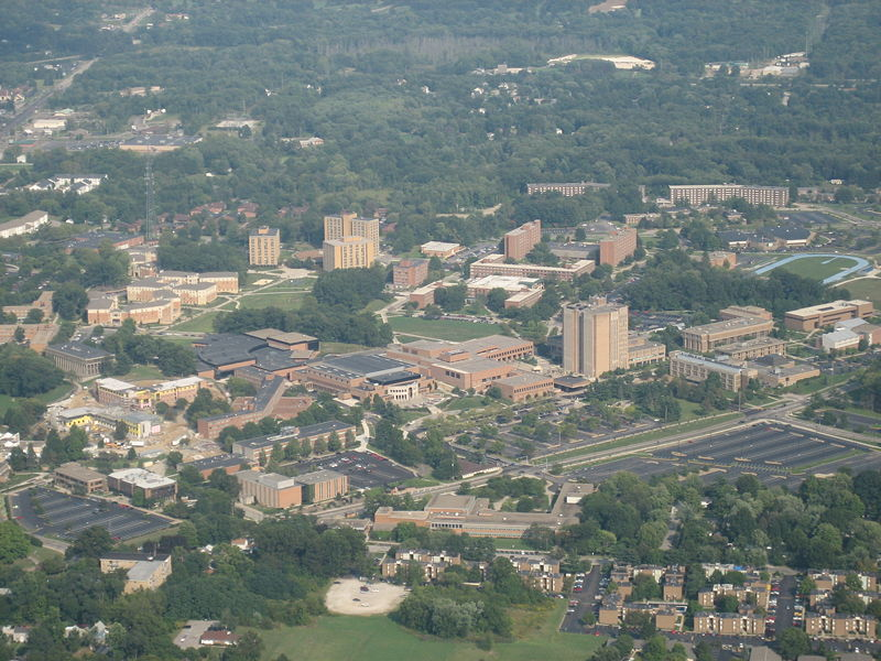 KSU aerialview